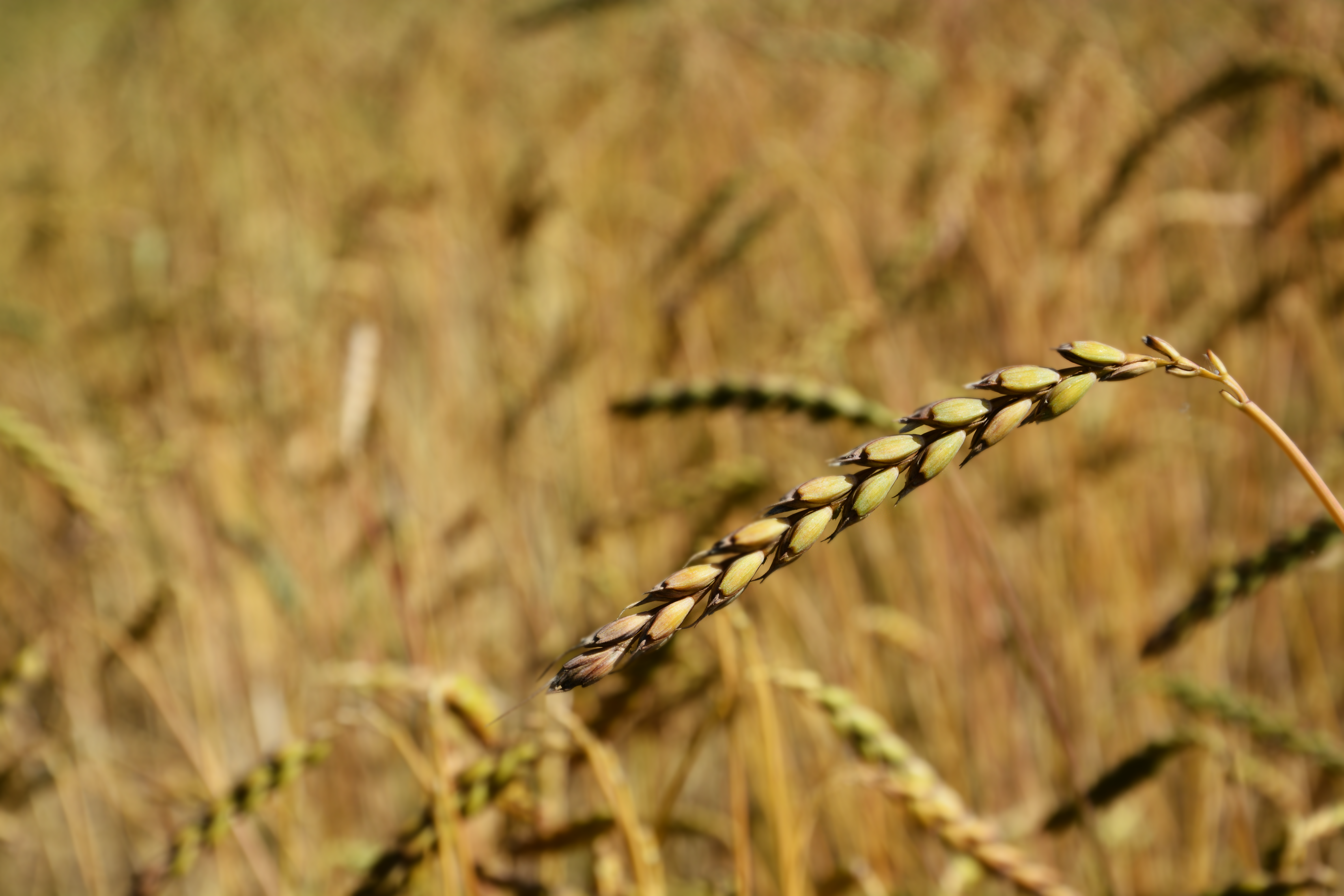 Dieses Getreidebild entstand in der Schweiz. Besuchen Sie doch auch meine Homepage